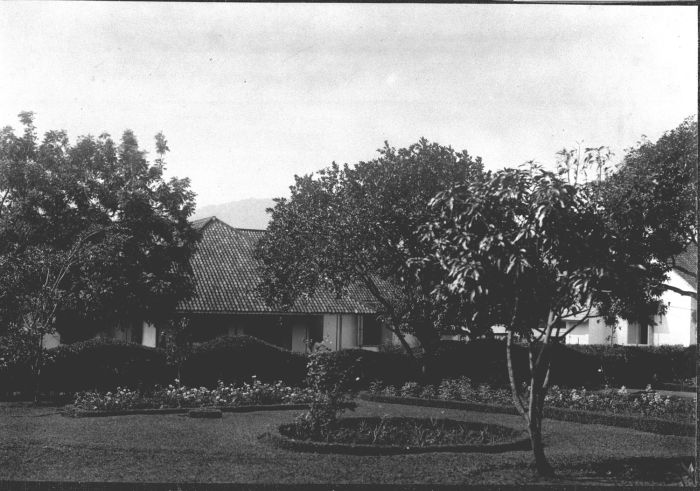 Foto. Krankzinnigengesticht Soember Porong 23 juni 1902 - 23 juni 1922, foto is onderdel van een panorama. Een tuin bij psychiatrisch ziekenhuis Soember Porrong